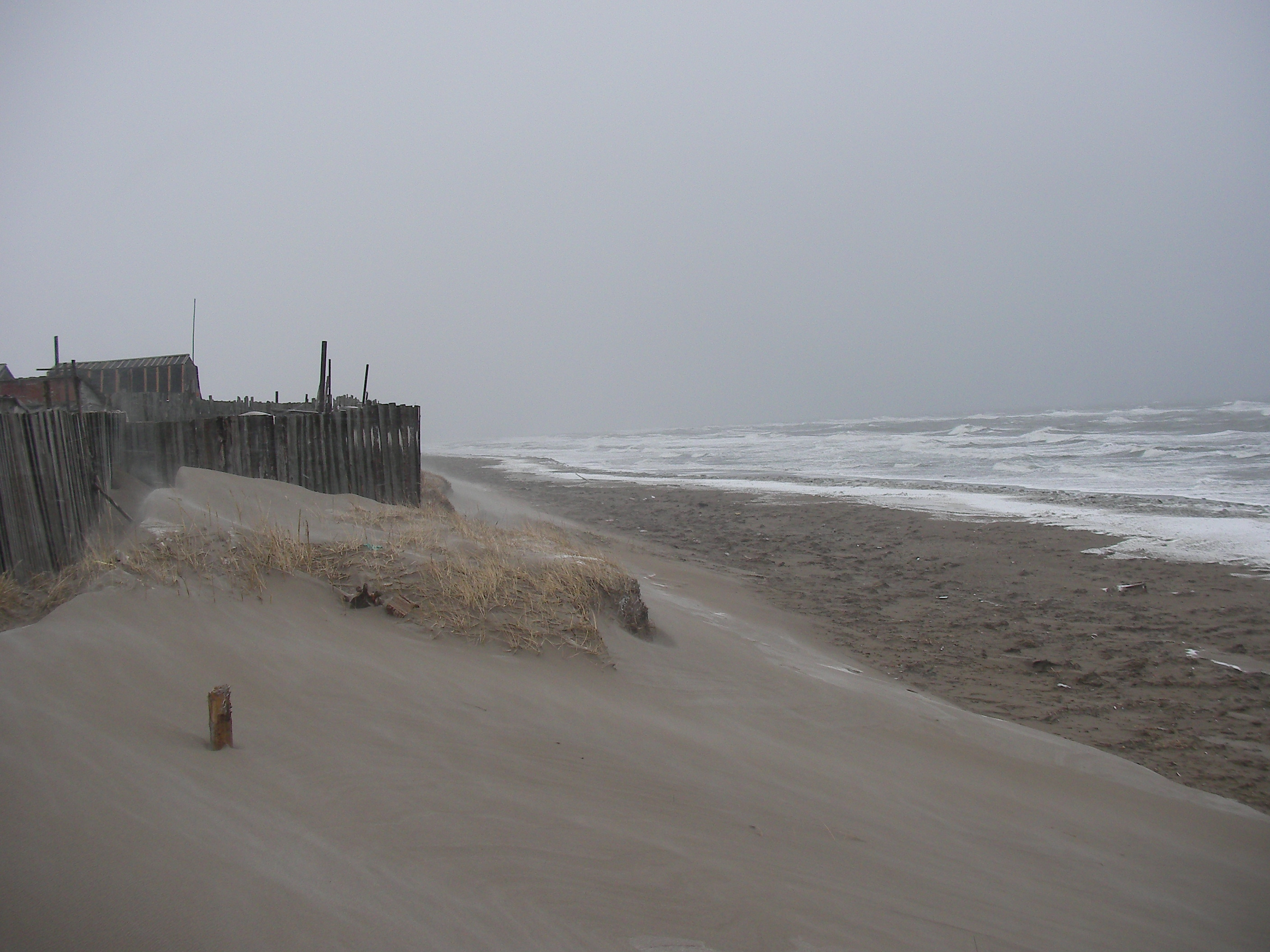 Шторм в Красногорске